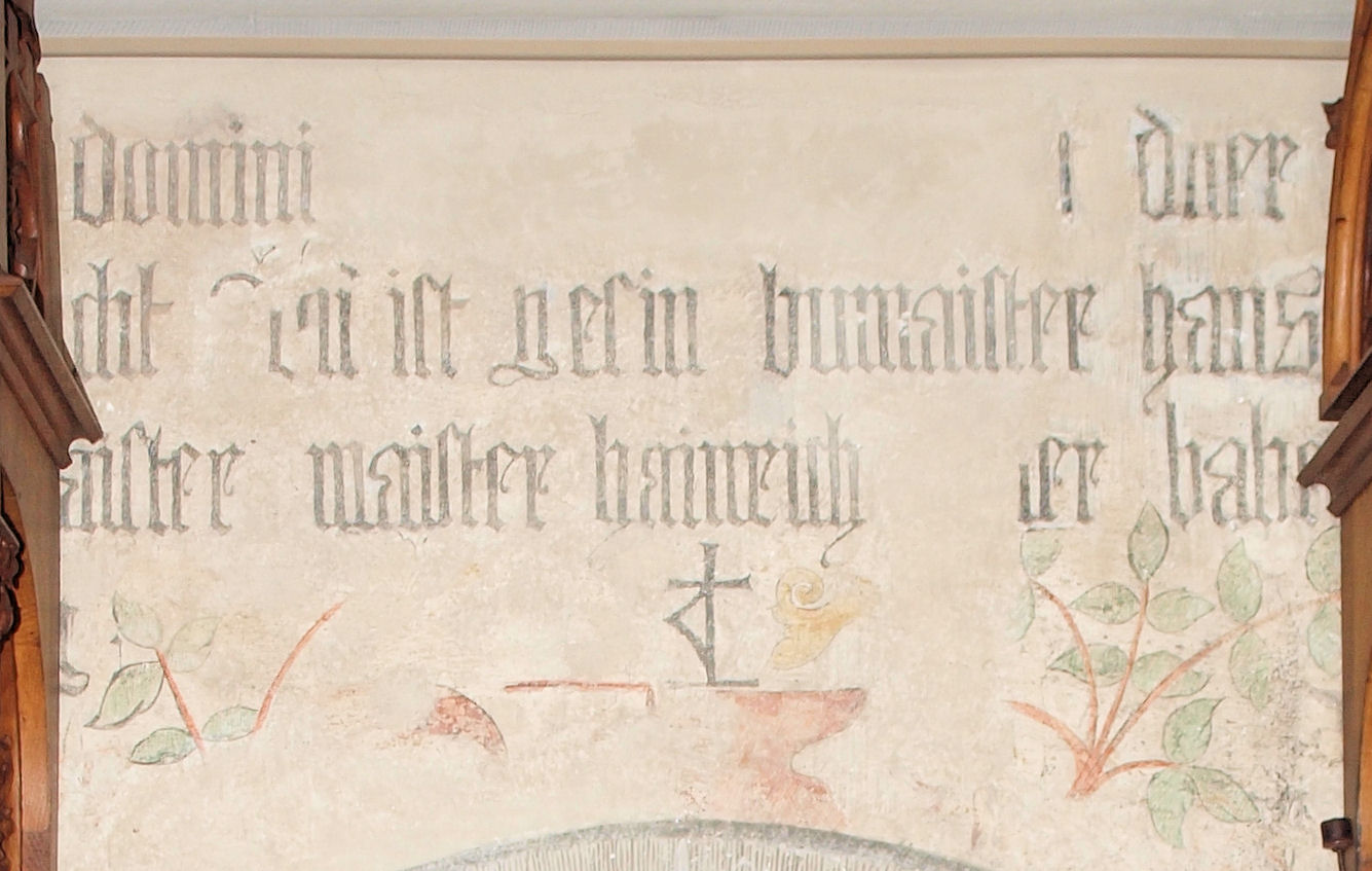 Die Bauinschrift über der Sakristeitüre im Chor der Pfarrkirche von Appenzell.